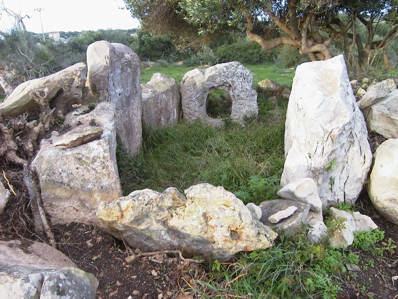 Sepulcre megalític d'Alcaidús d'en Fàbregues (Alaior)